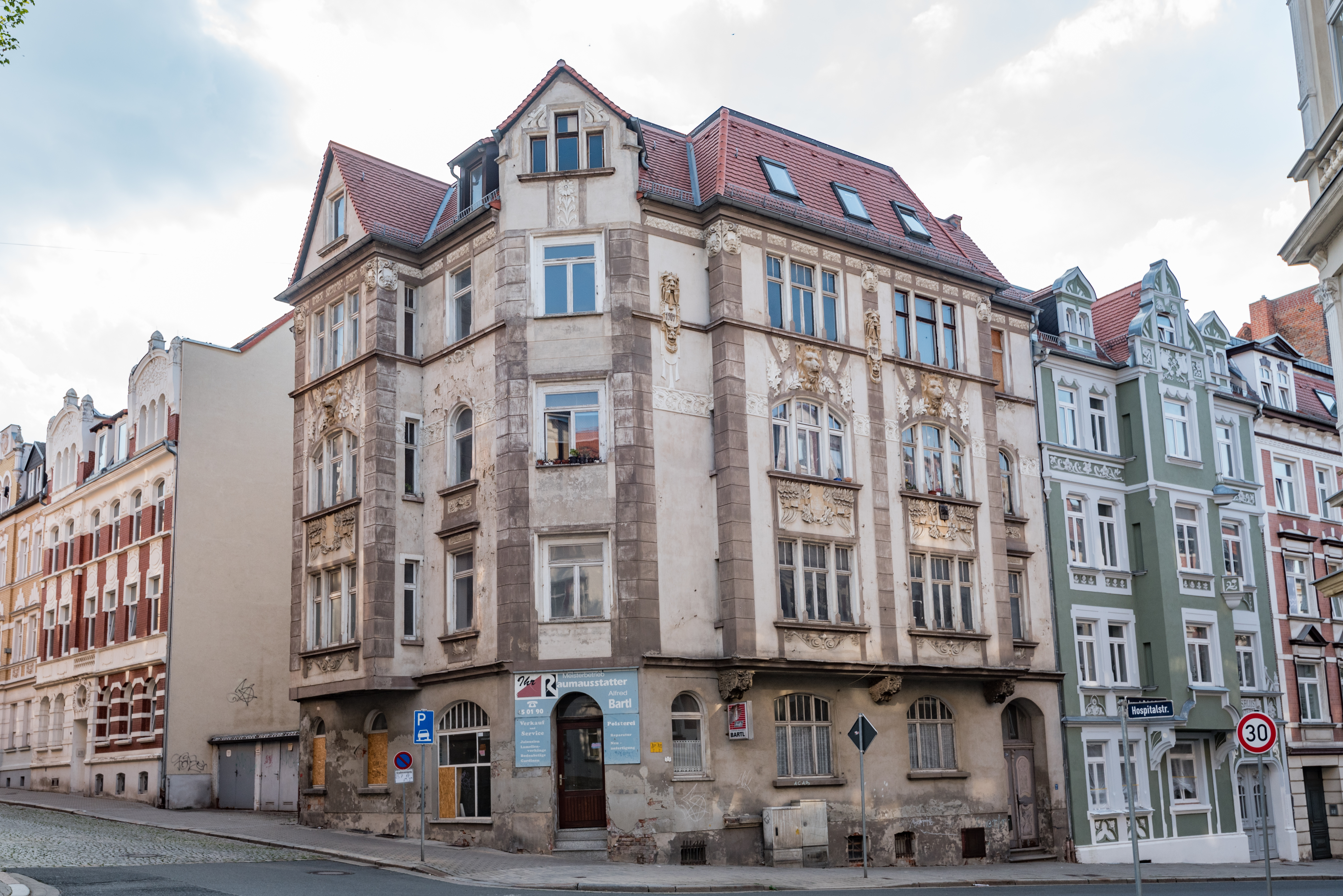 Zeitz, August-Bebel-Straße 26